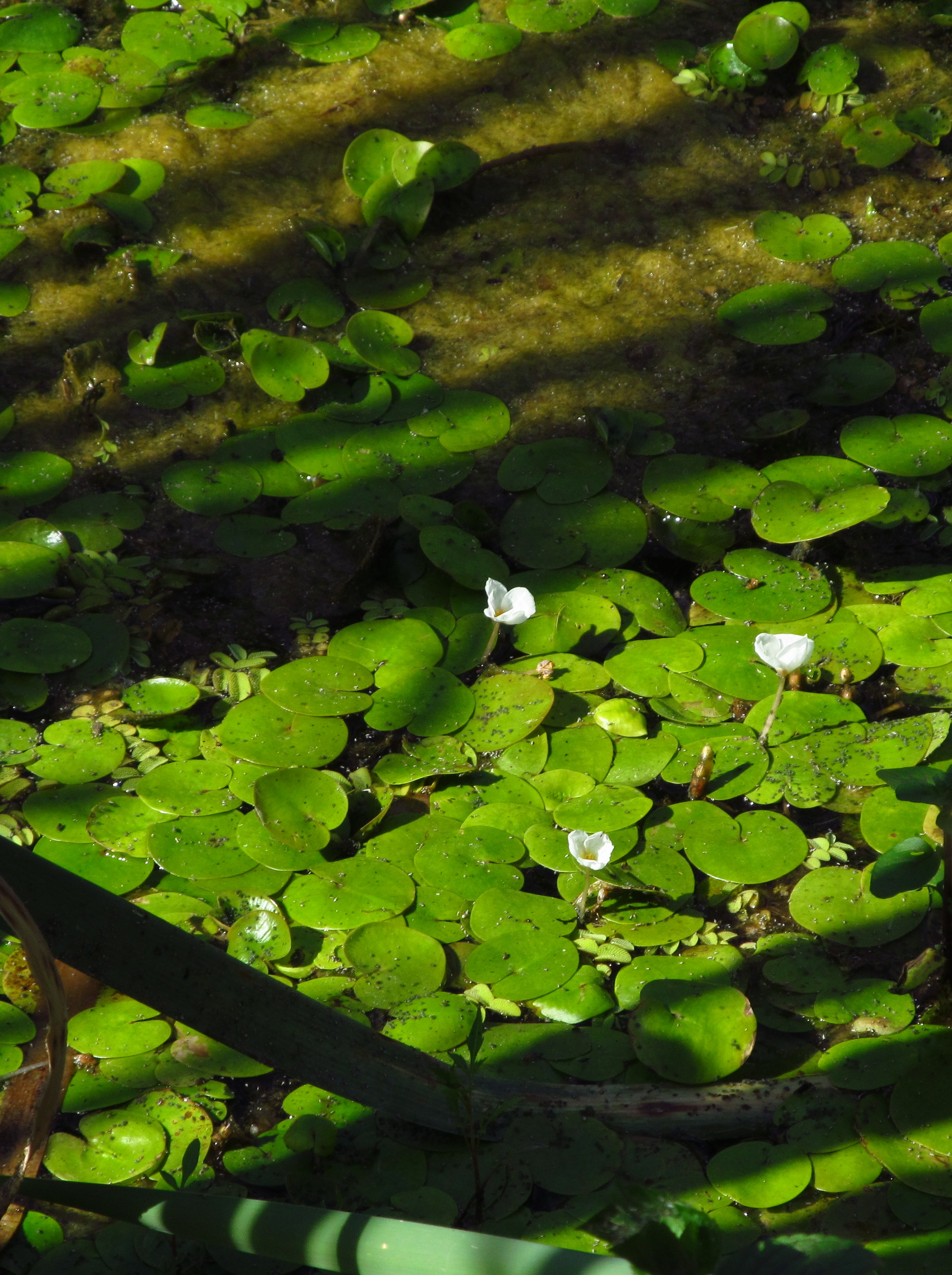 Srpski (latinica): žabogriz (Hydrocharis morsus-ranae)